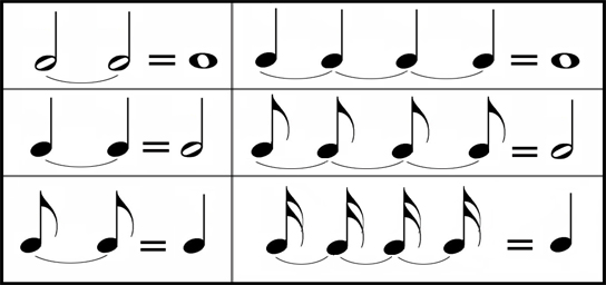 خط اتحاد